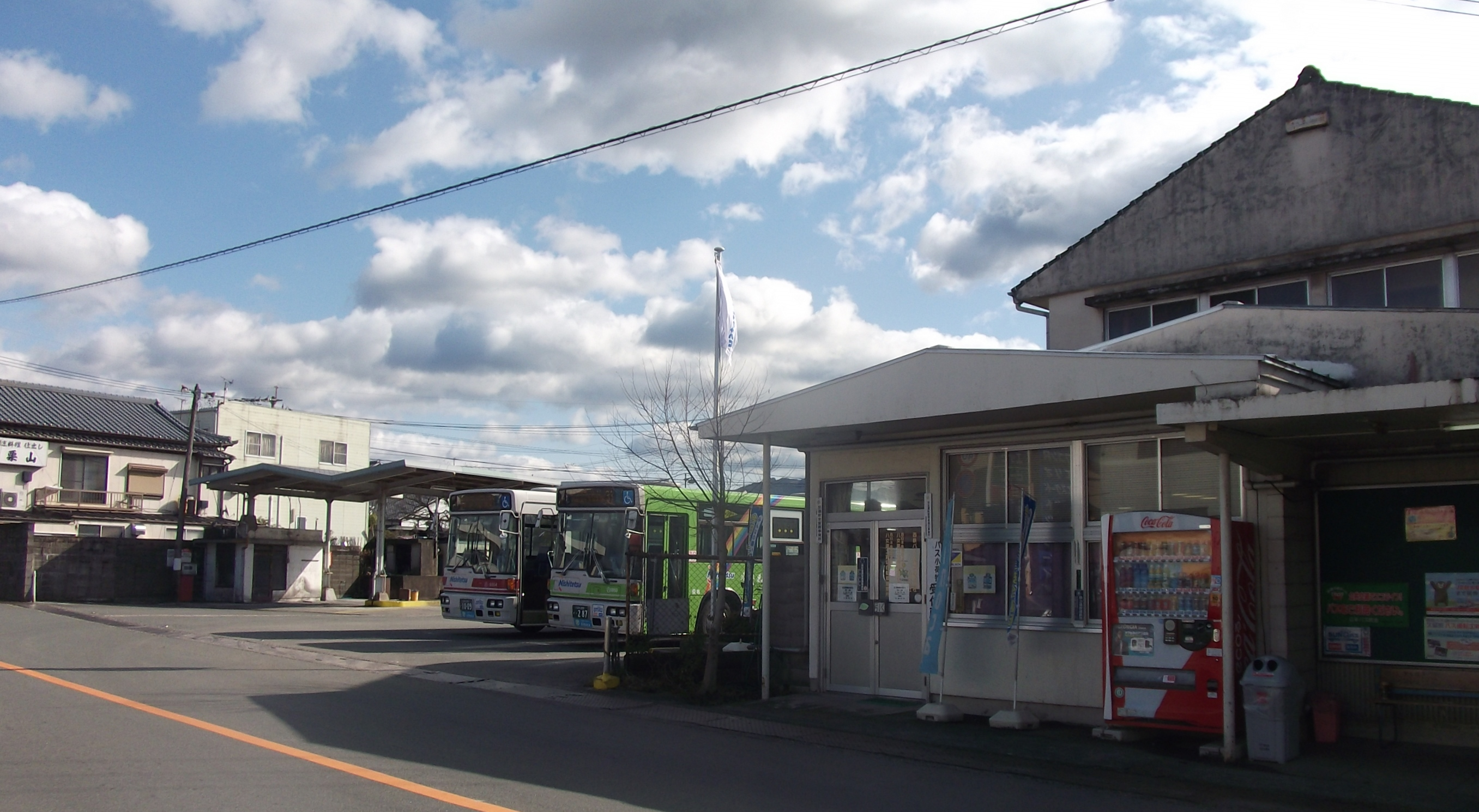 西鉄バス久留米・八女車庫（2014年2月9日）。